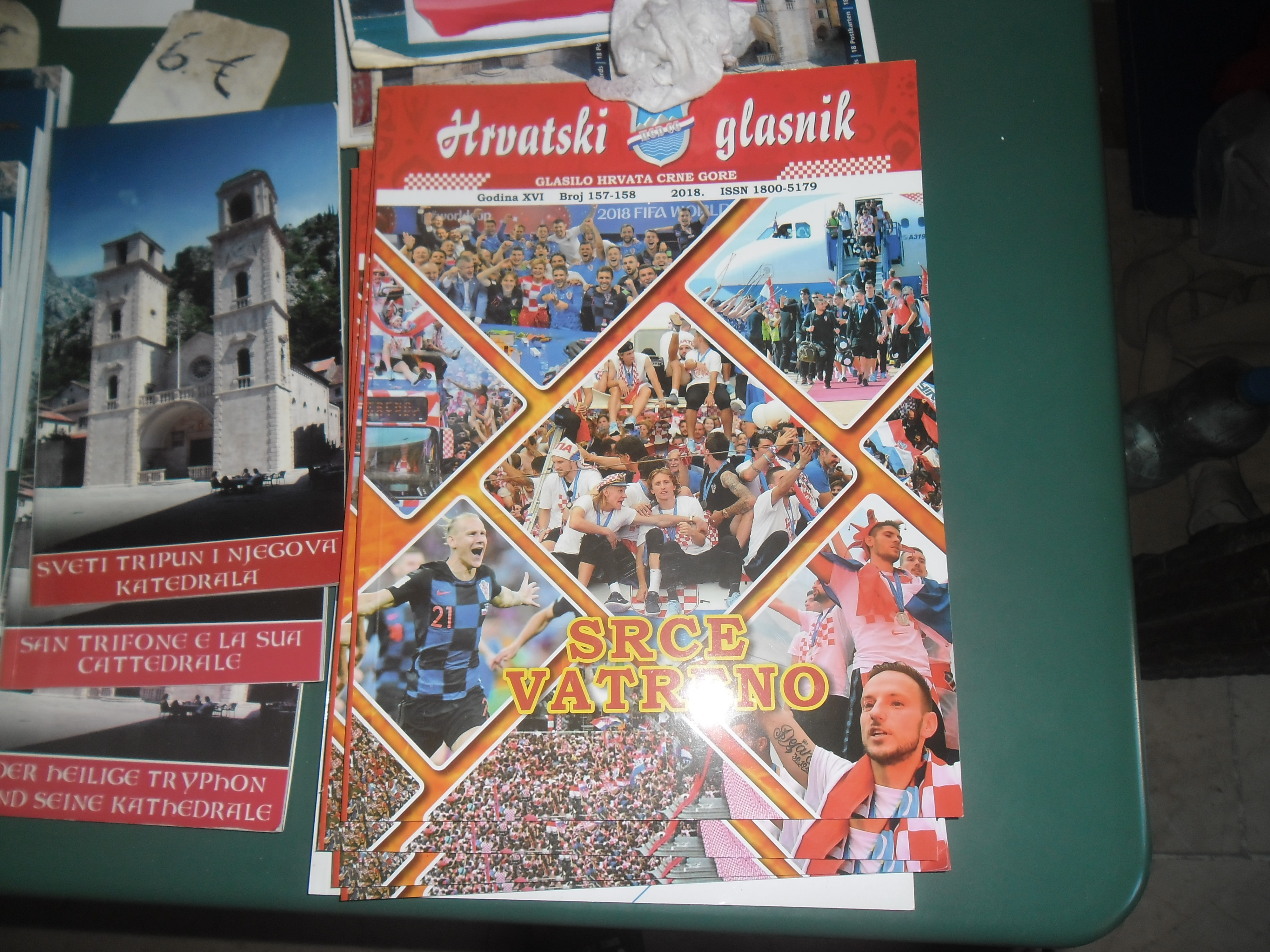 Katedrala svetoga Tripuna u Kotoru